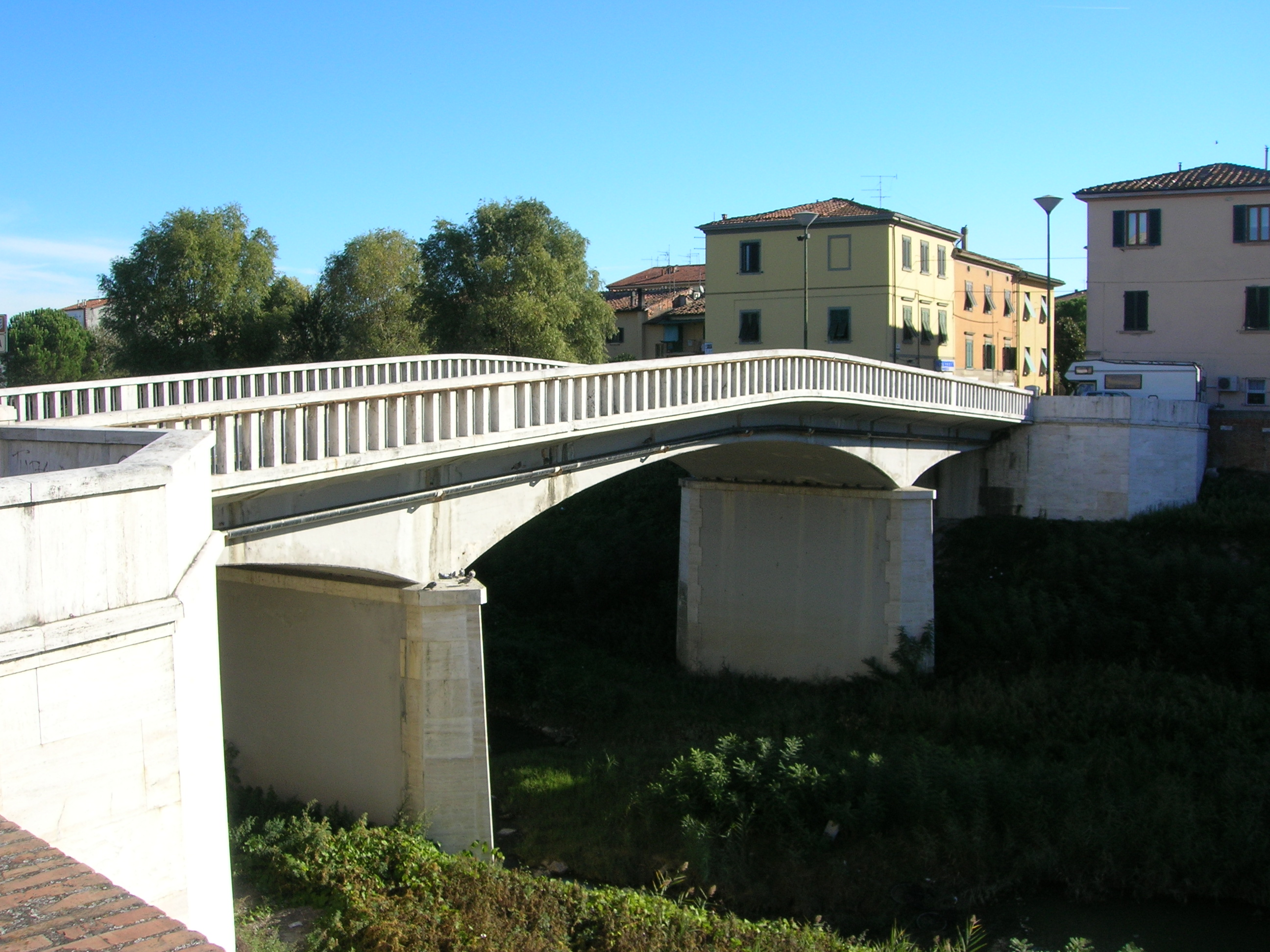 Pontedera - Ponte napoleonico visto da sud